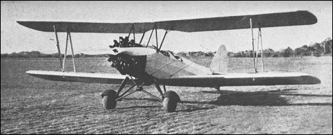 Tachikawa Ki-17 Cedar training aircraft